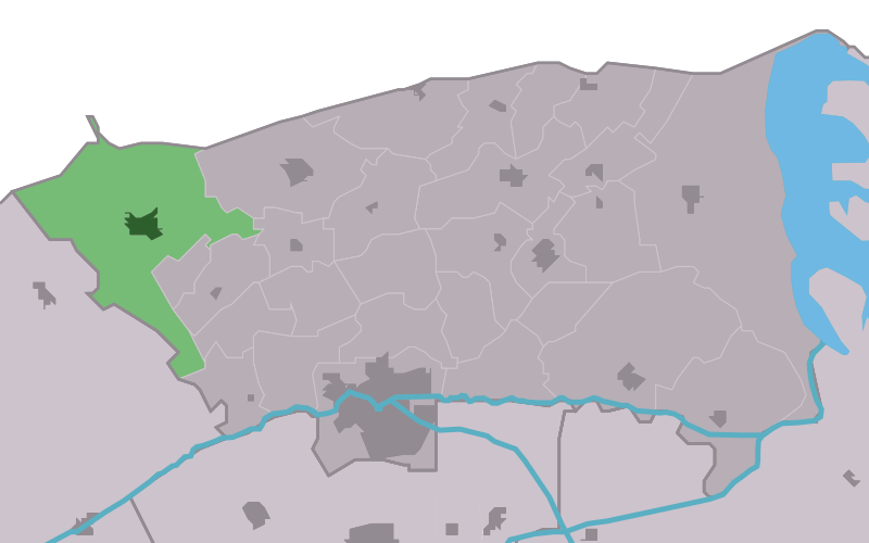 Kaartsje fan himrik fan Holwert